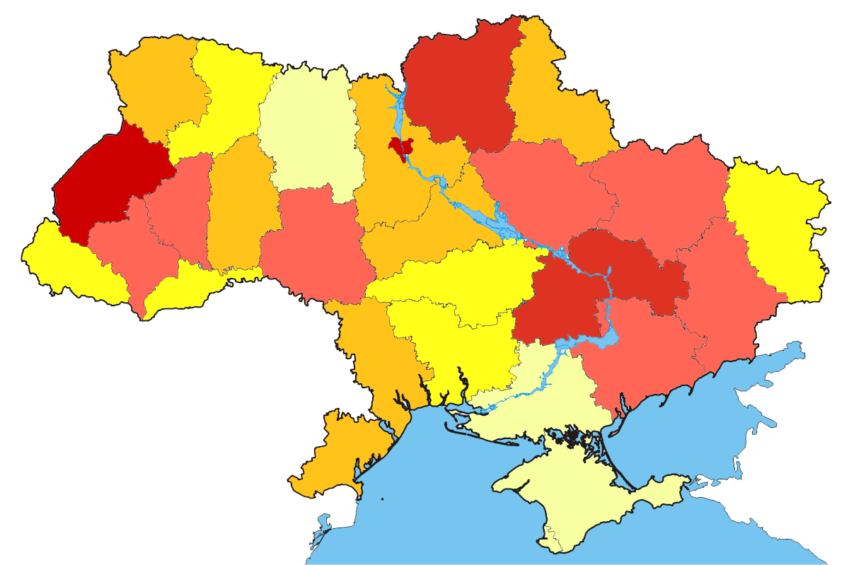 Wikipedians atlas: Атлас вікіпедистів